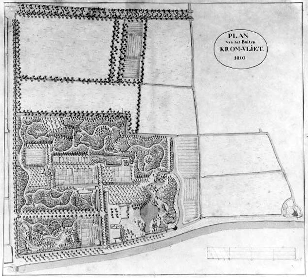 Plan of the park of Cromvliet in Rijswijk, Netherlands